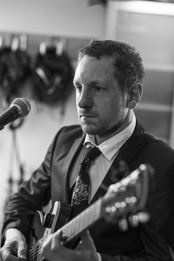 Kuersche, Musiker